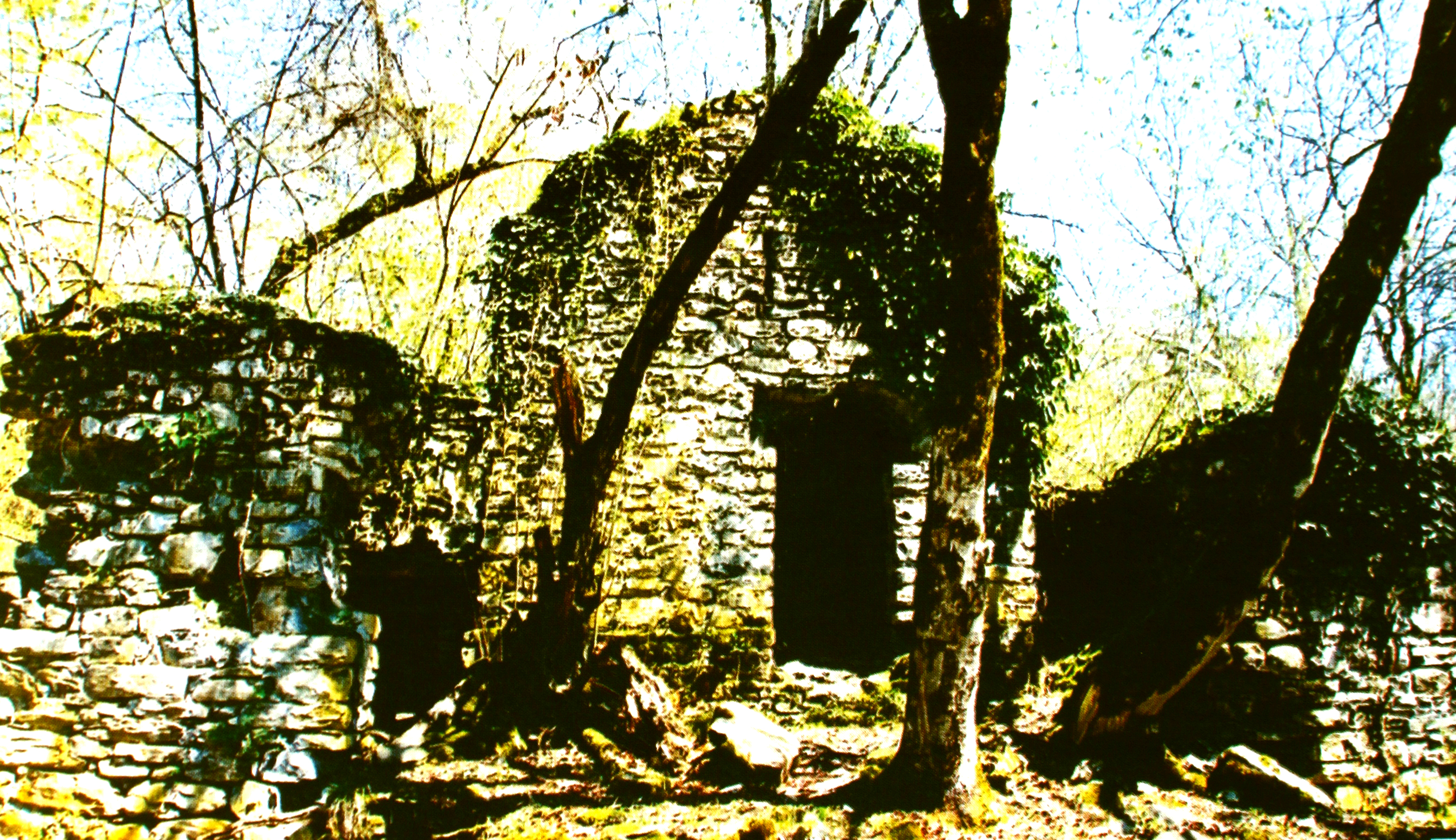 Pipan, üçnefli bazilika